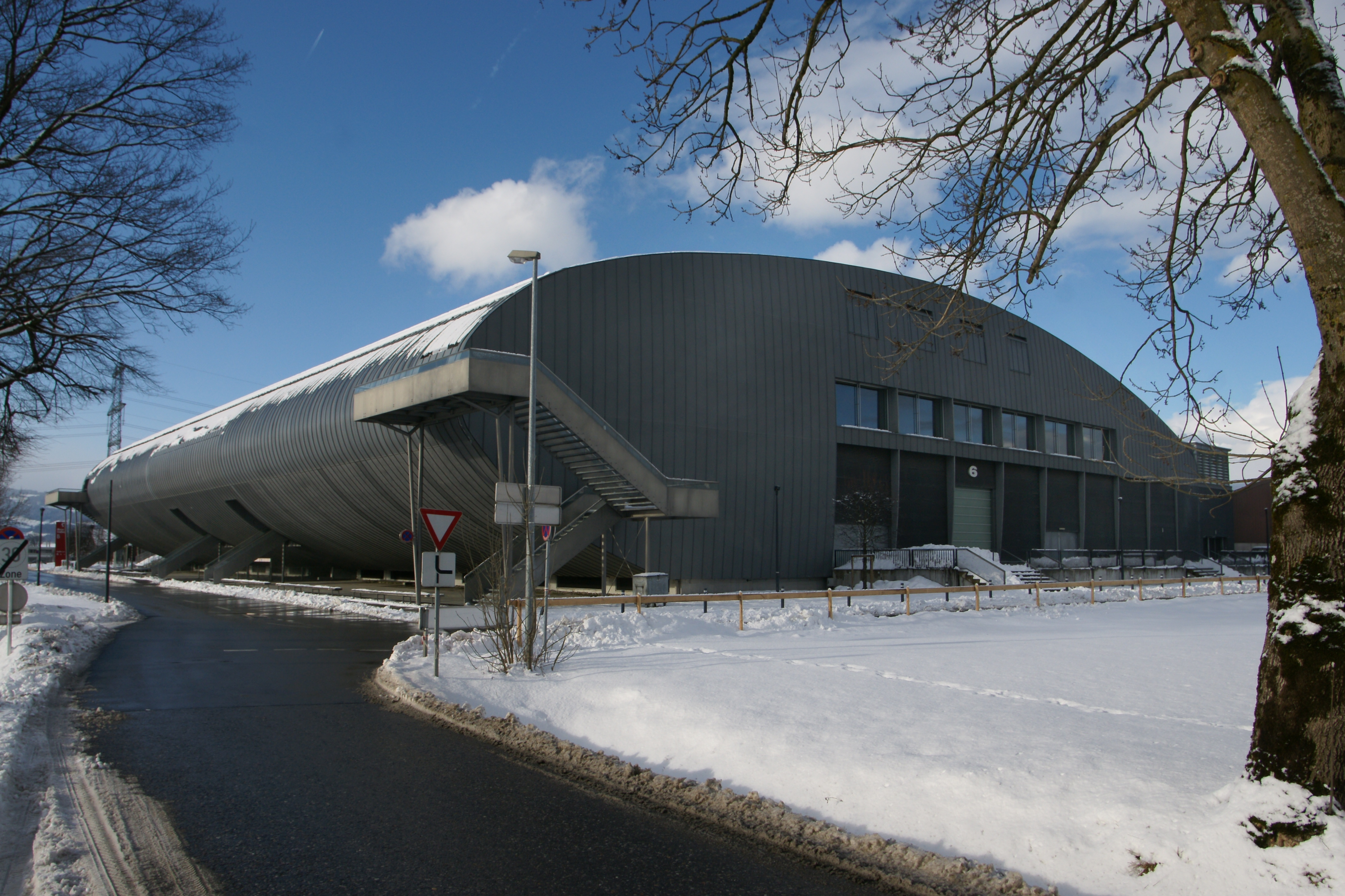 Messestadion Dornbirn im Schoren, 2003 erbaut nach Plänen von Architekt "Leopold Kaufmann".